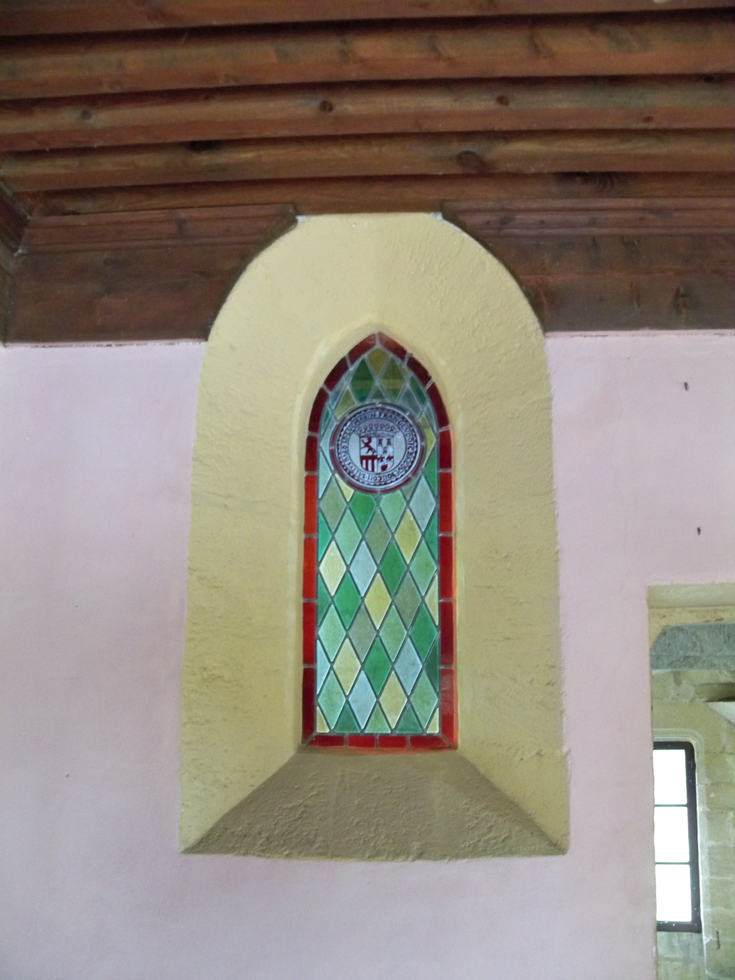 Vitrail au château de Lourmarin (84)